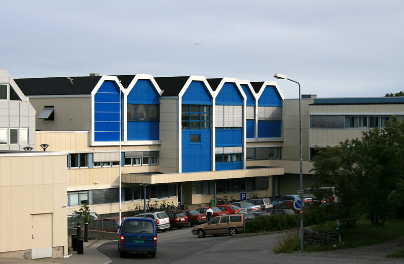 Brønnøysundregistrene